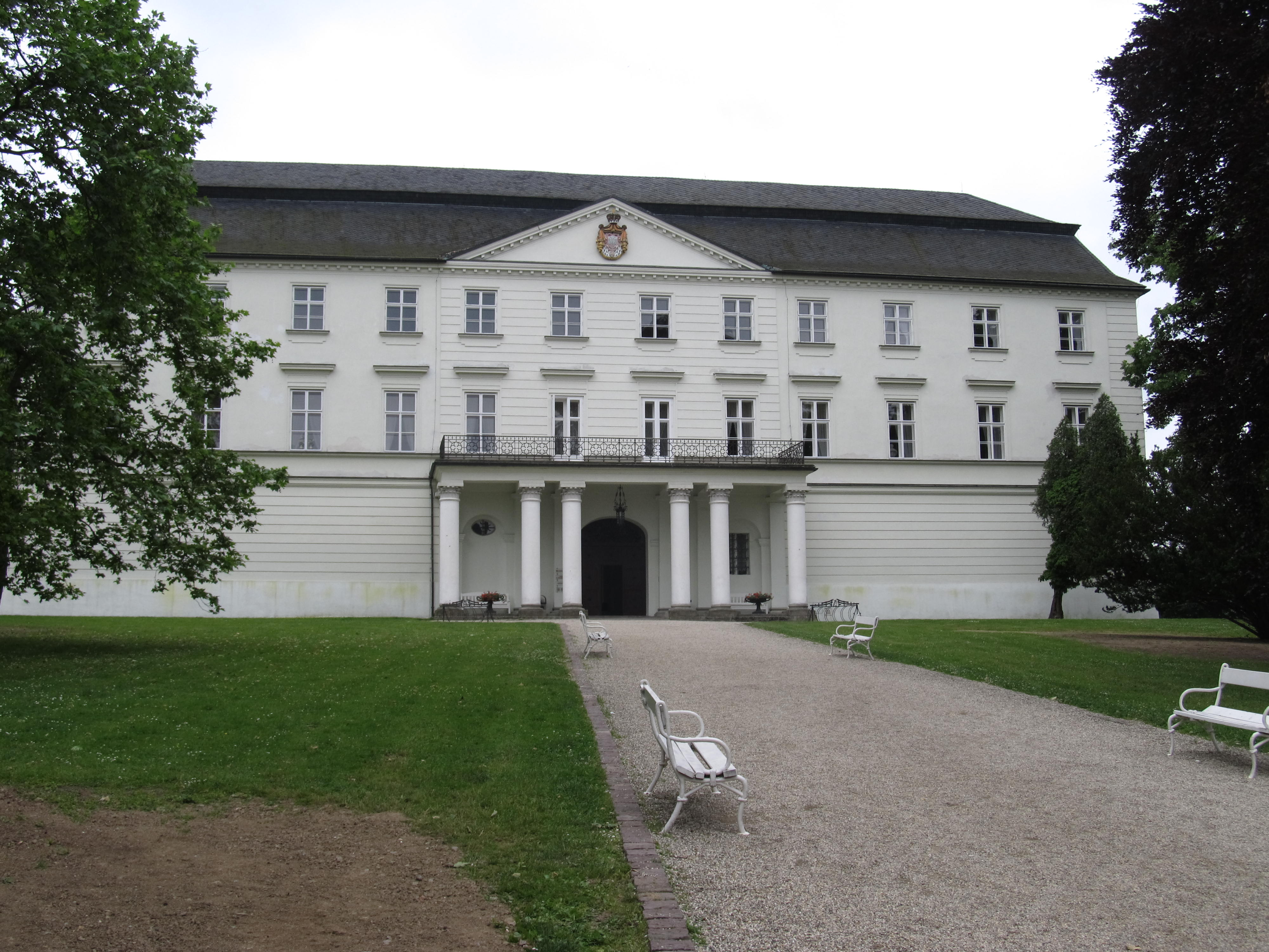 Bílý zámek